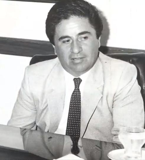 Eduardo Duhalde como Intendente de Lomas de Zamora, cargo que ocupó desde 1973 hasta el golpe militar de 1976.